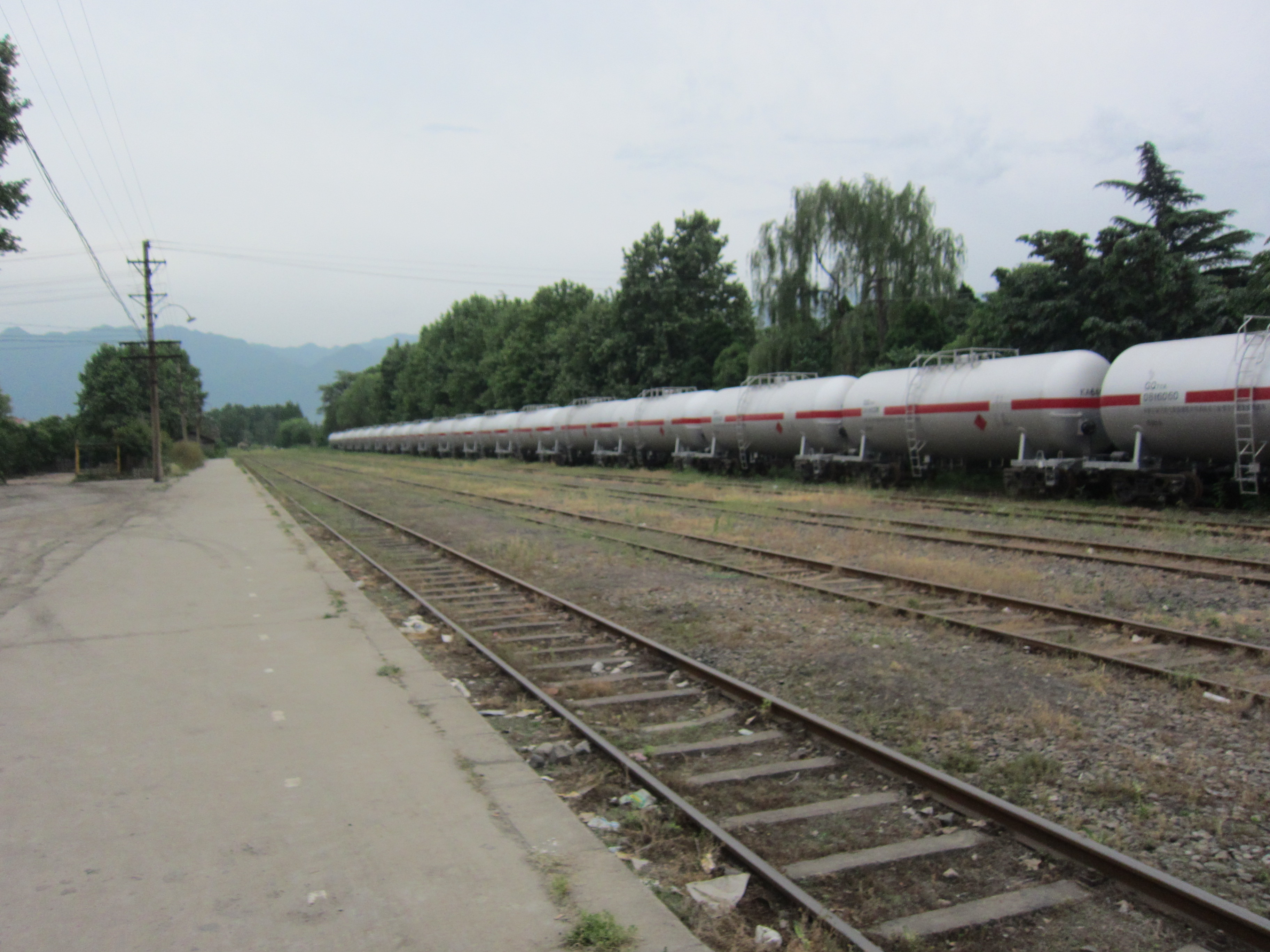 西安市鄠邑区余下镇余下火车站